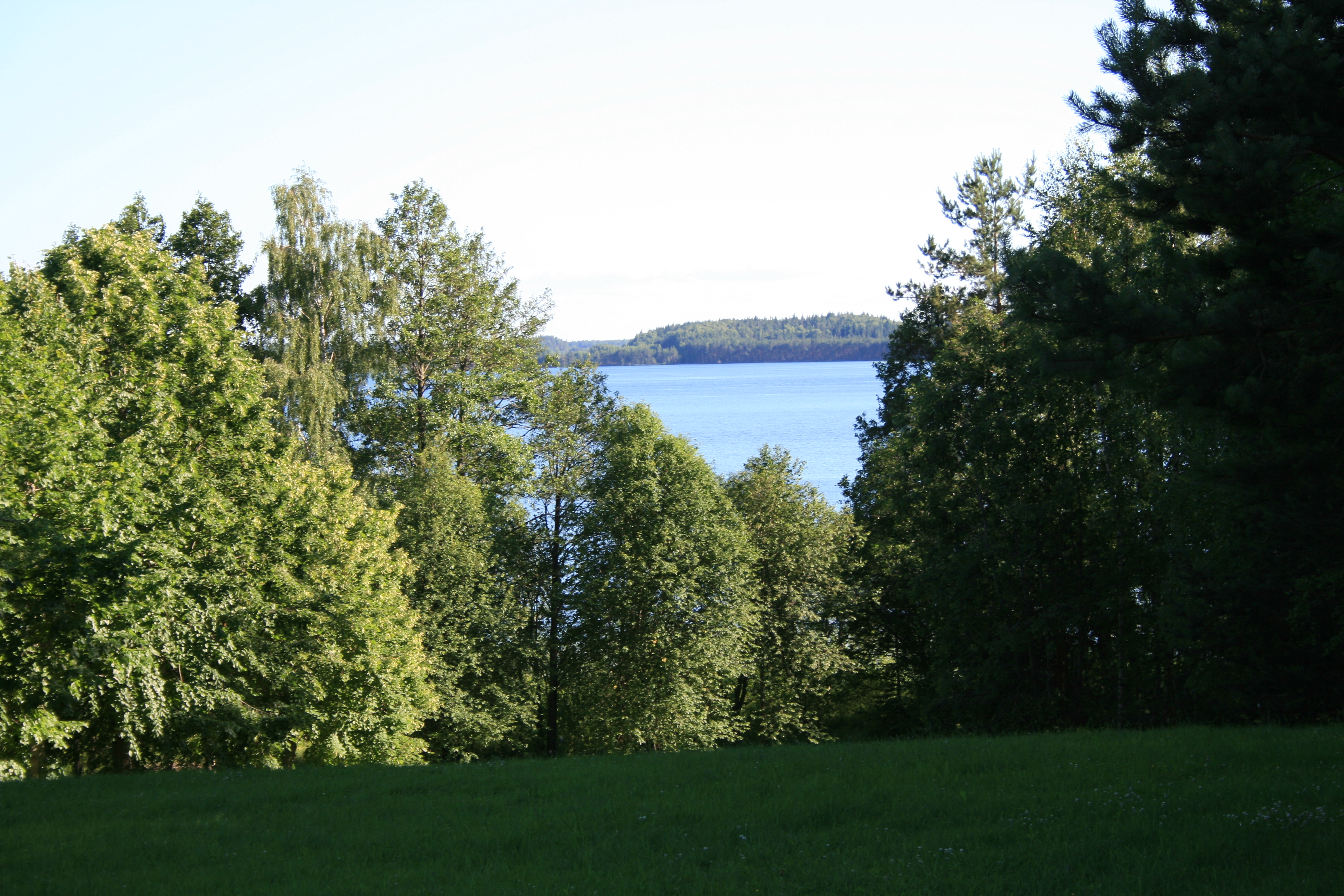 Ungura ezers